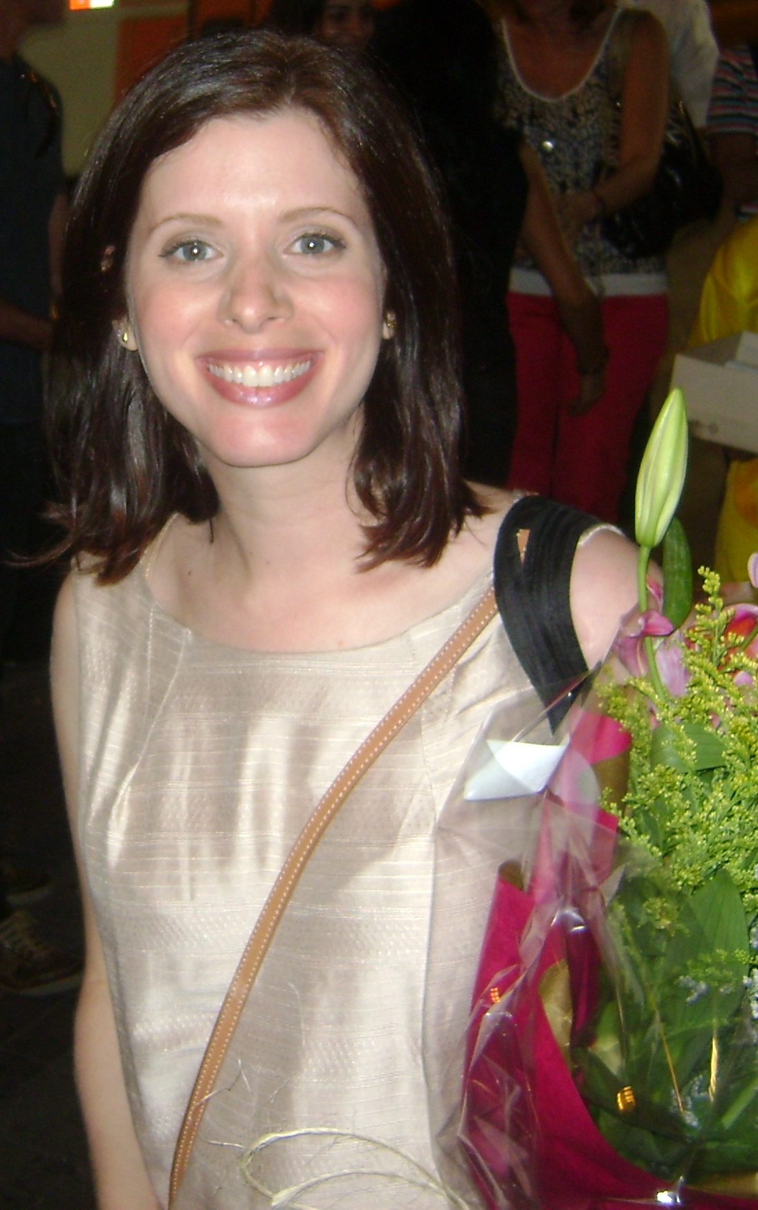 Daniele Valente, atriz brasileira, grávida de quatro meses, após a apresentação da peça "Mulheres Alteradas", em São Paulo.